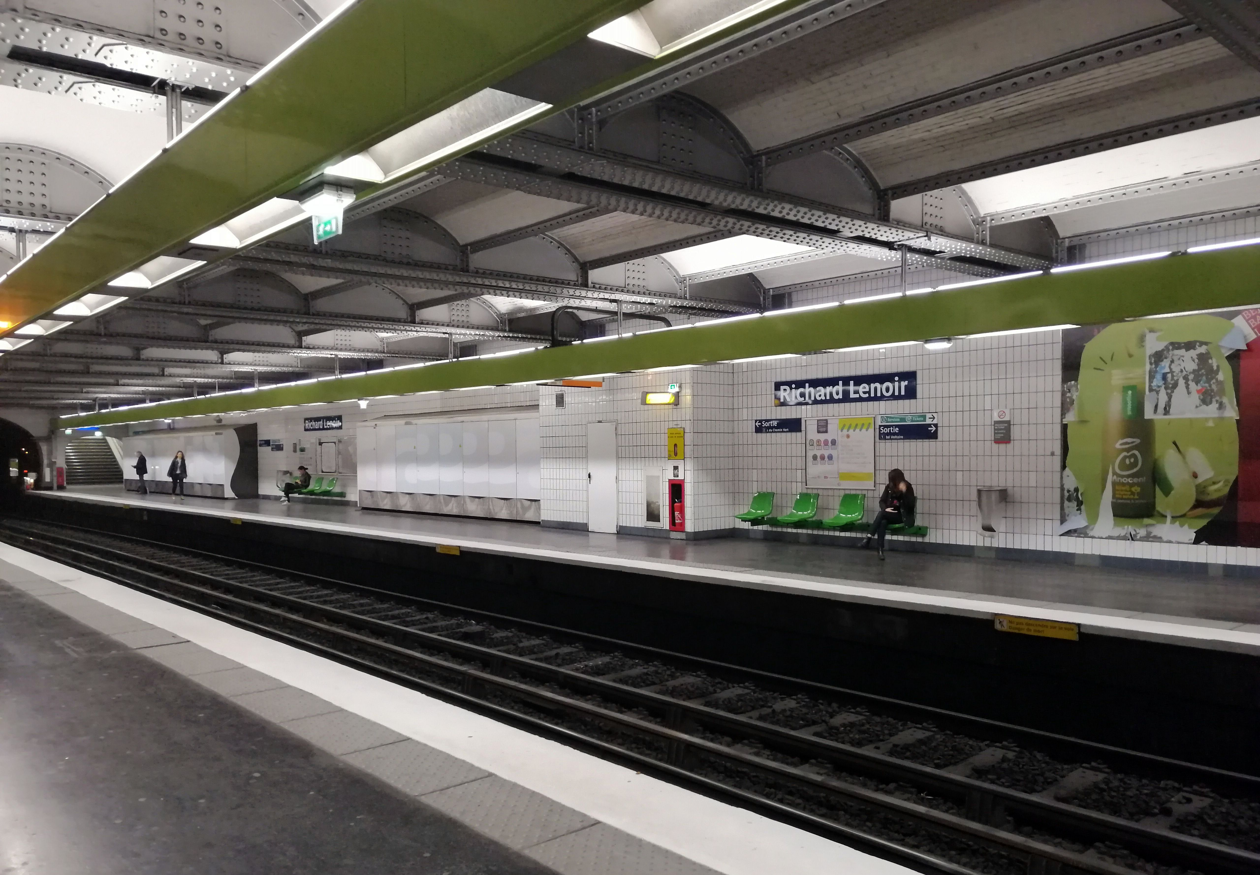 La estación de Richard Lenoir en 2019